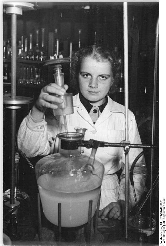 Zentralbild Krueger 23.9.1952 Vorschläge zur Auszeichnung als Aktivist im Berliner Glühlampen-Werk. Inge Fippel ist bester Lehrling im 3. Lehrjahr und wurde für ihre hervorragenden Leistungen zur Auszeichnung als Aktivistin am 13.10.1952 vorgeschlagen. Sie will chemische Laborantin werden.